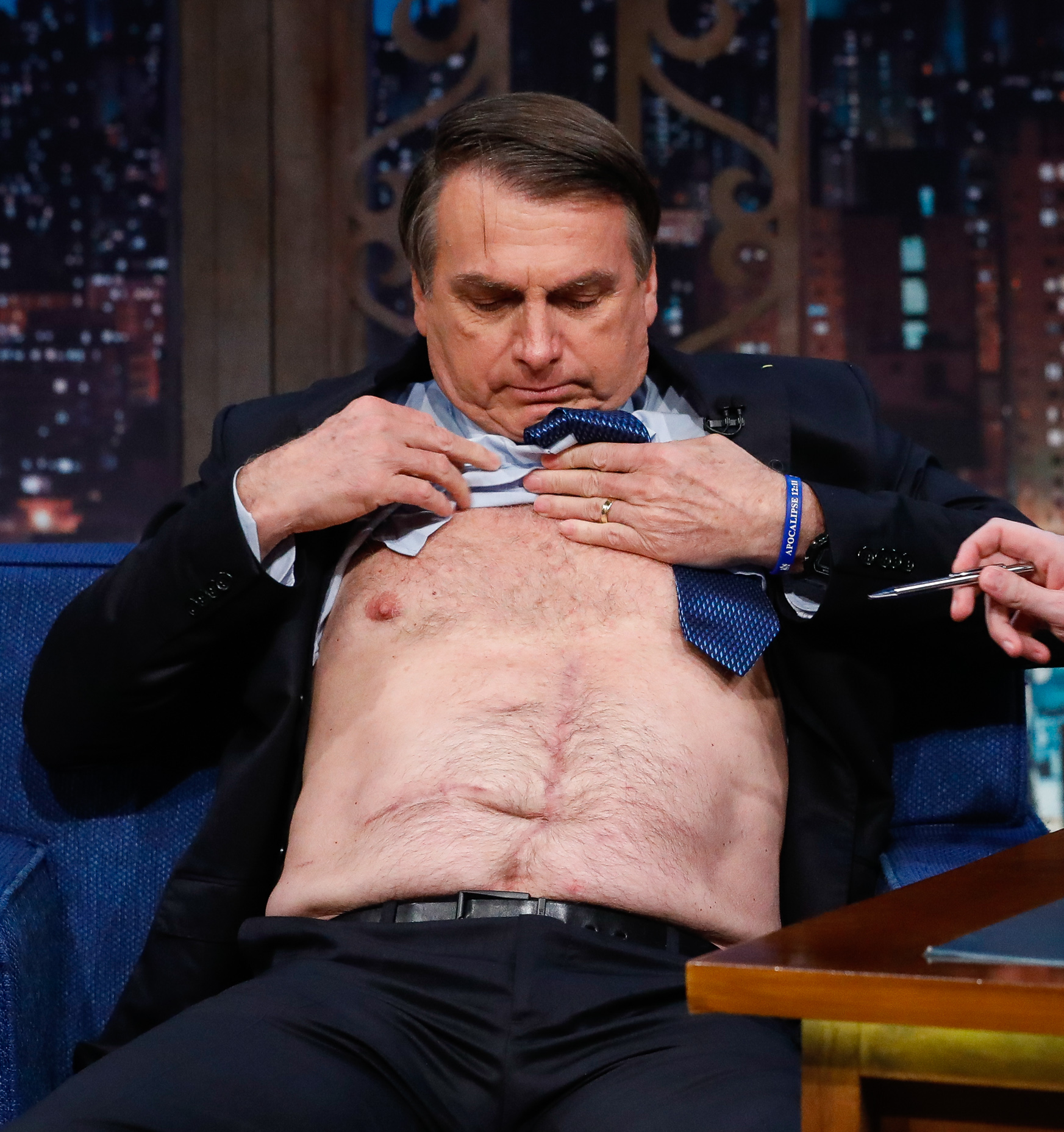 (São Paulo - SP, 30/05/2019) Entrevista ao Apresentador Danilo Gentili para o Programa The Noite do SBT, gravada dia 29 de maio. Foto: Alan Santos/PR